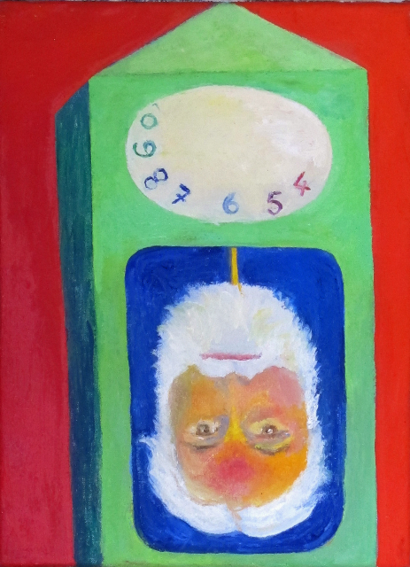 Selbstportrait von Max Rüedi aus dem Jahr 2013, Eitempera, Baumwolle, 18 x 24 cm